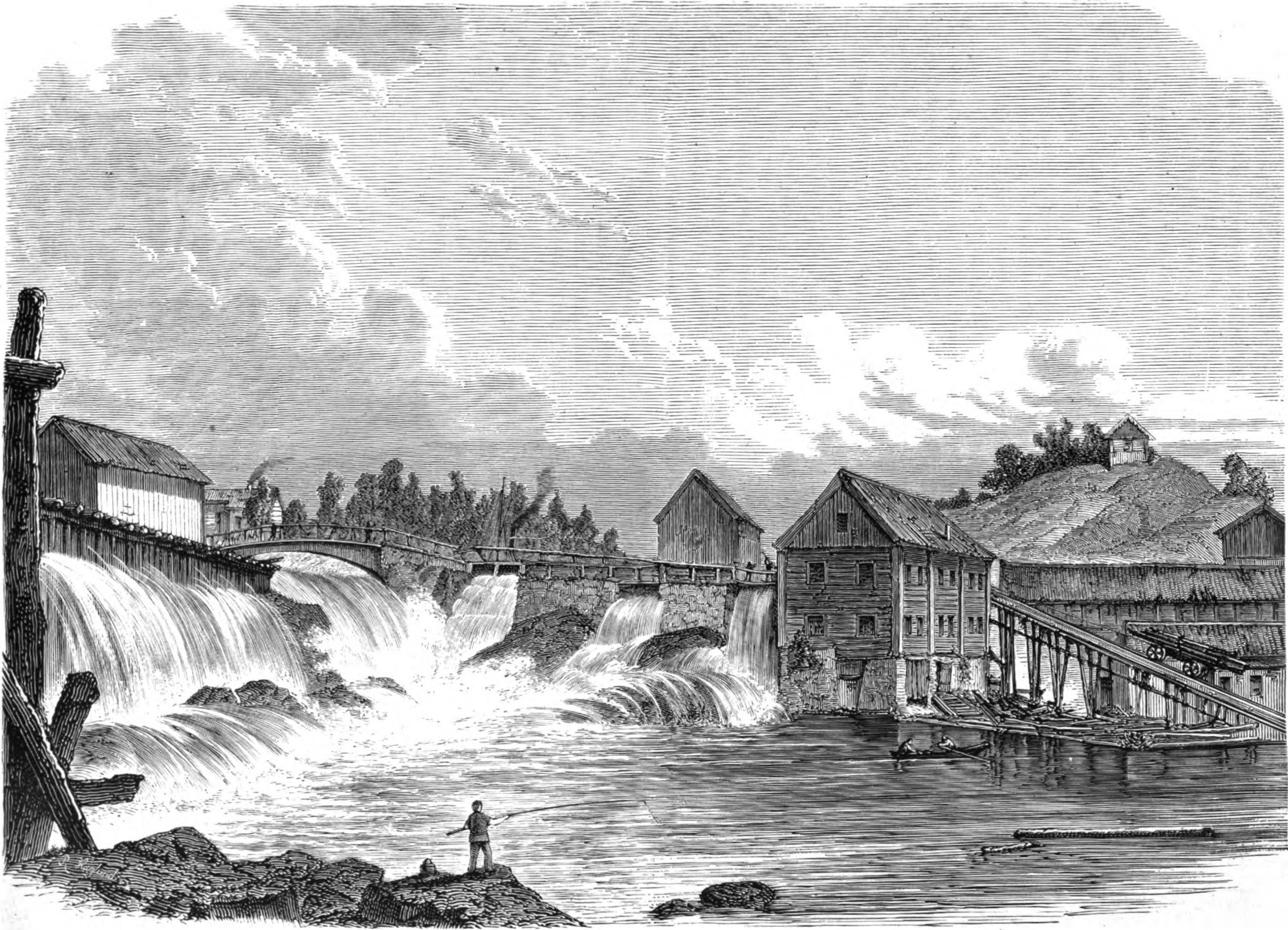 Lennartsfors bruk vid Dalslands kanal i Värmland.